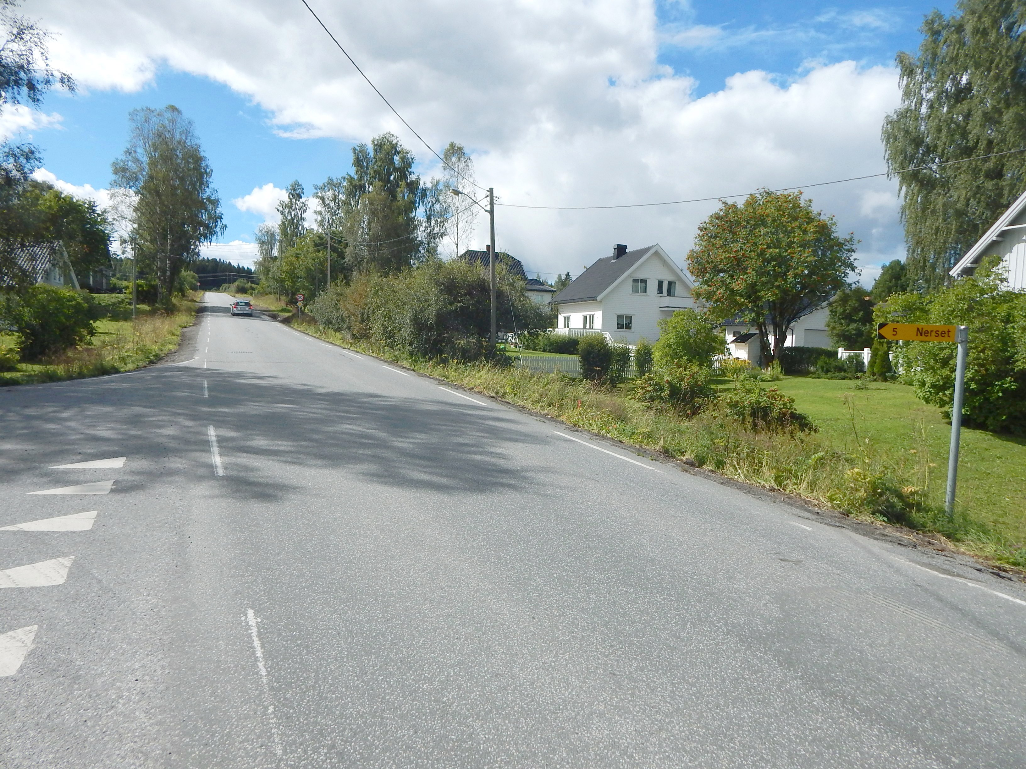 Børsvollvegen (FV2370, tidl. FV111) nær veidelet med FV2374